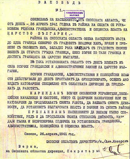 Заповед на скопския областен управител Антон Козаров, с която в областта се въвежда българско управление.